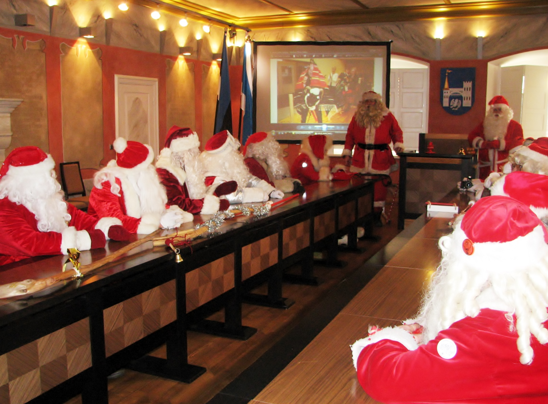 XIII jõuluvanade pressikonverents Kuressaare raekojas